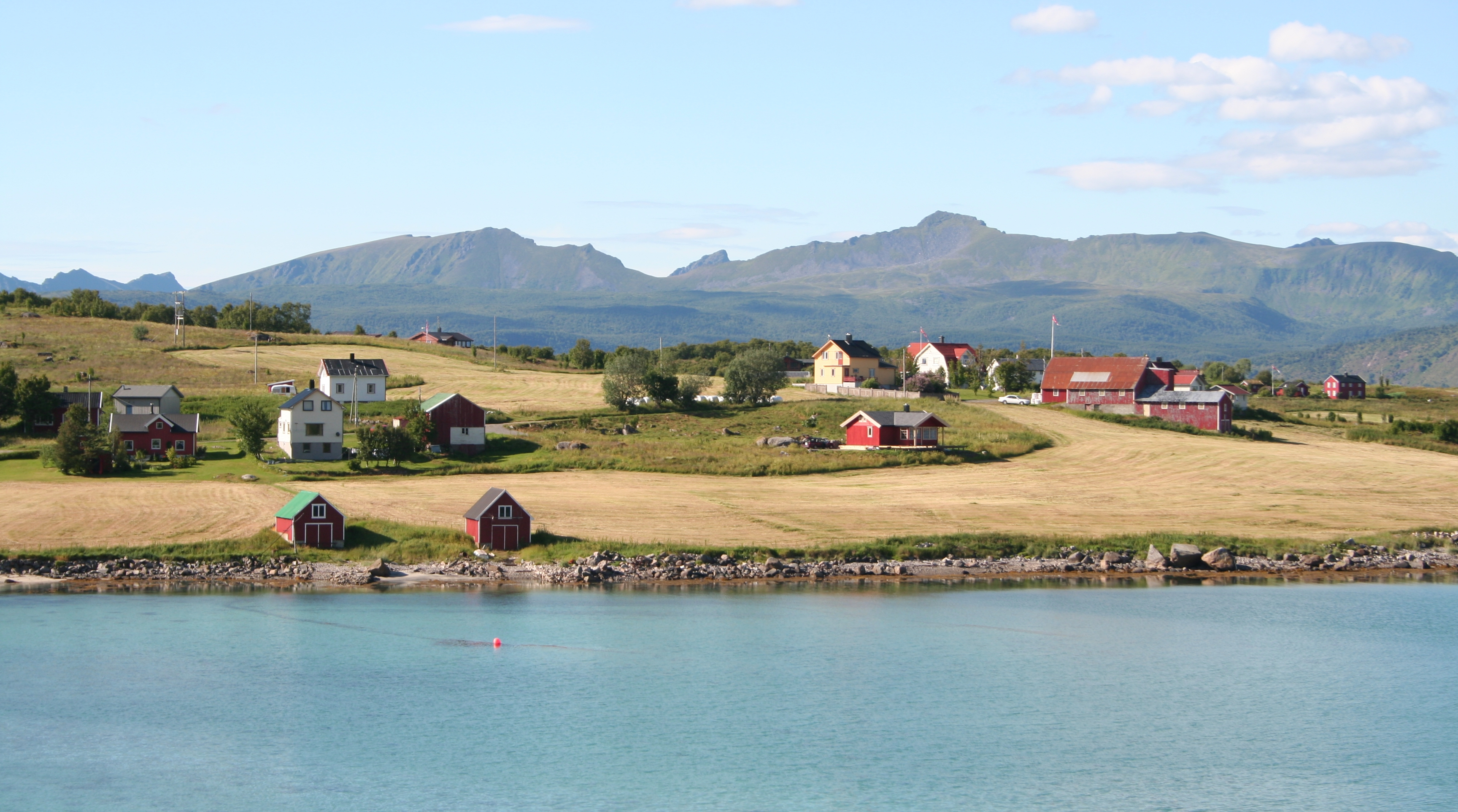 Gårdsbruk på Holdøya i Hadsel kommune i NordlandUnknown small farms on holdøya island in hadsel munucupality, norway